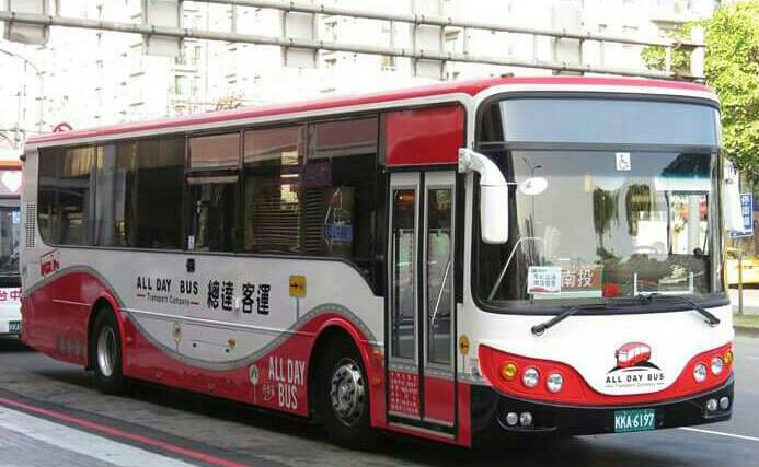 總達客運大客車KKA-6197右側